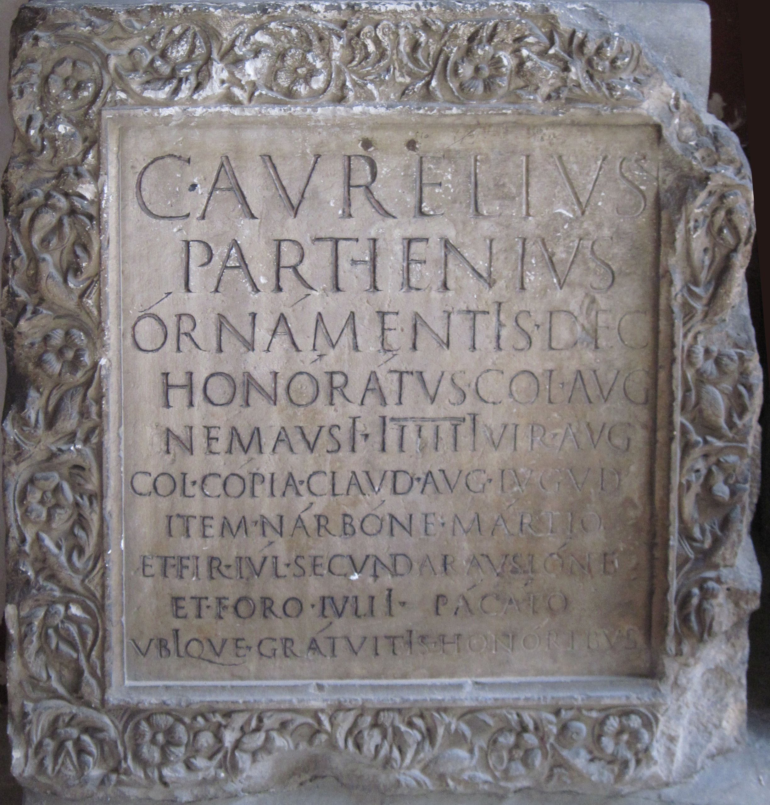 Interlingua: Inscription latin notabile pro su uso del «apice», le symbolo diacritic un pauc como un accento acute, que designa un vocal longe.